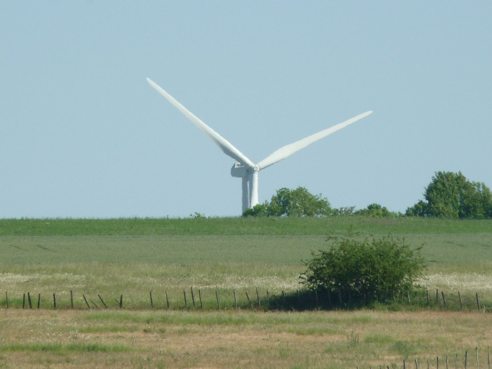 éolienne de Xambes vue depuis le donjon de Montignac, Charente, France